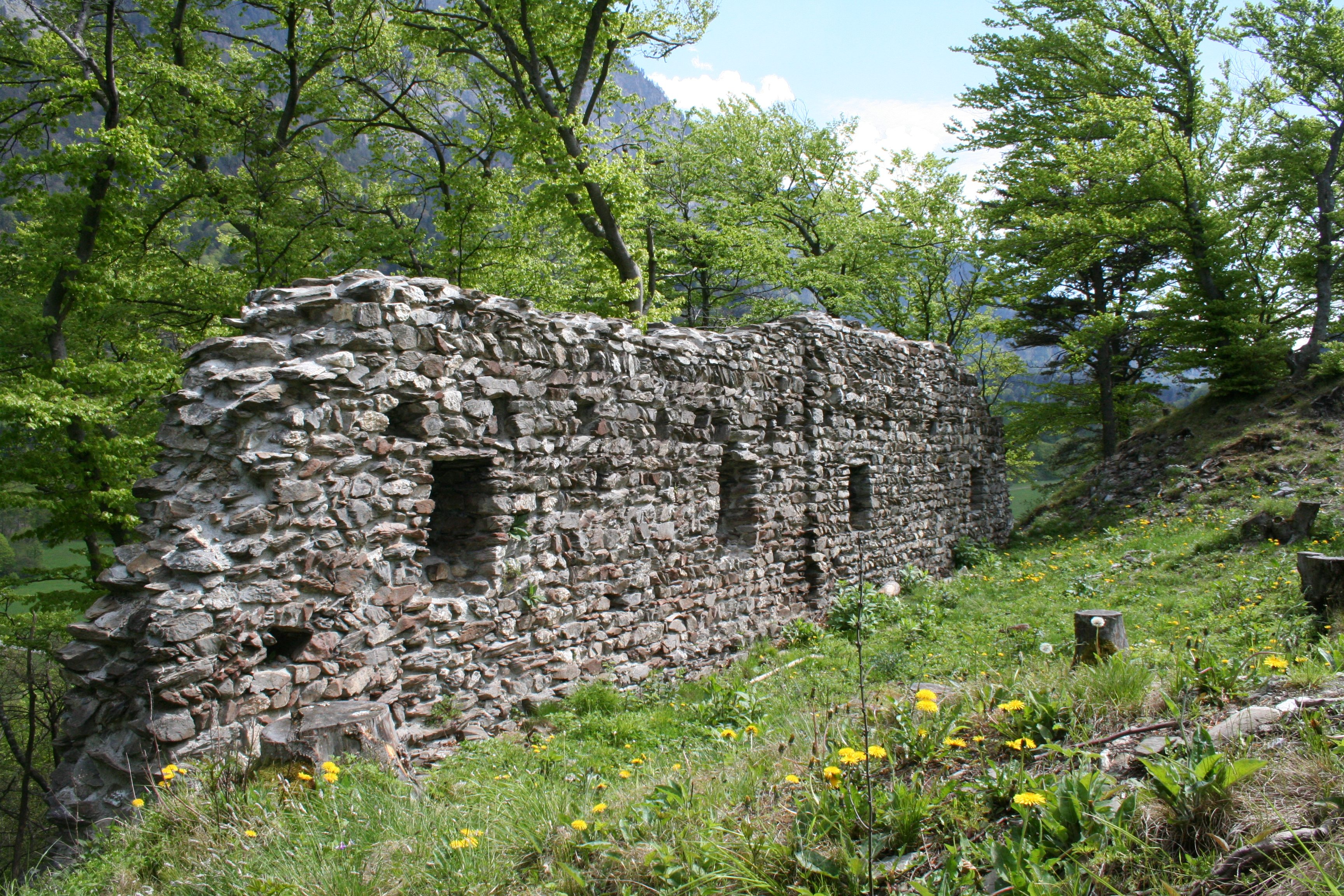 Hügel Grafenberg; Blick nach Südosten